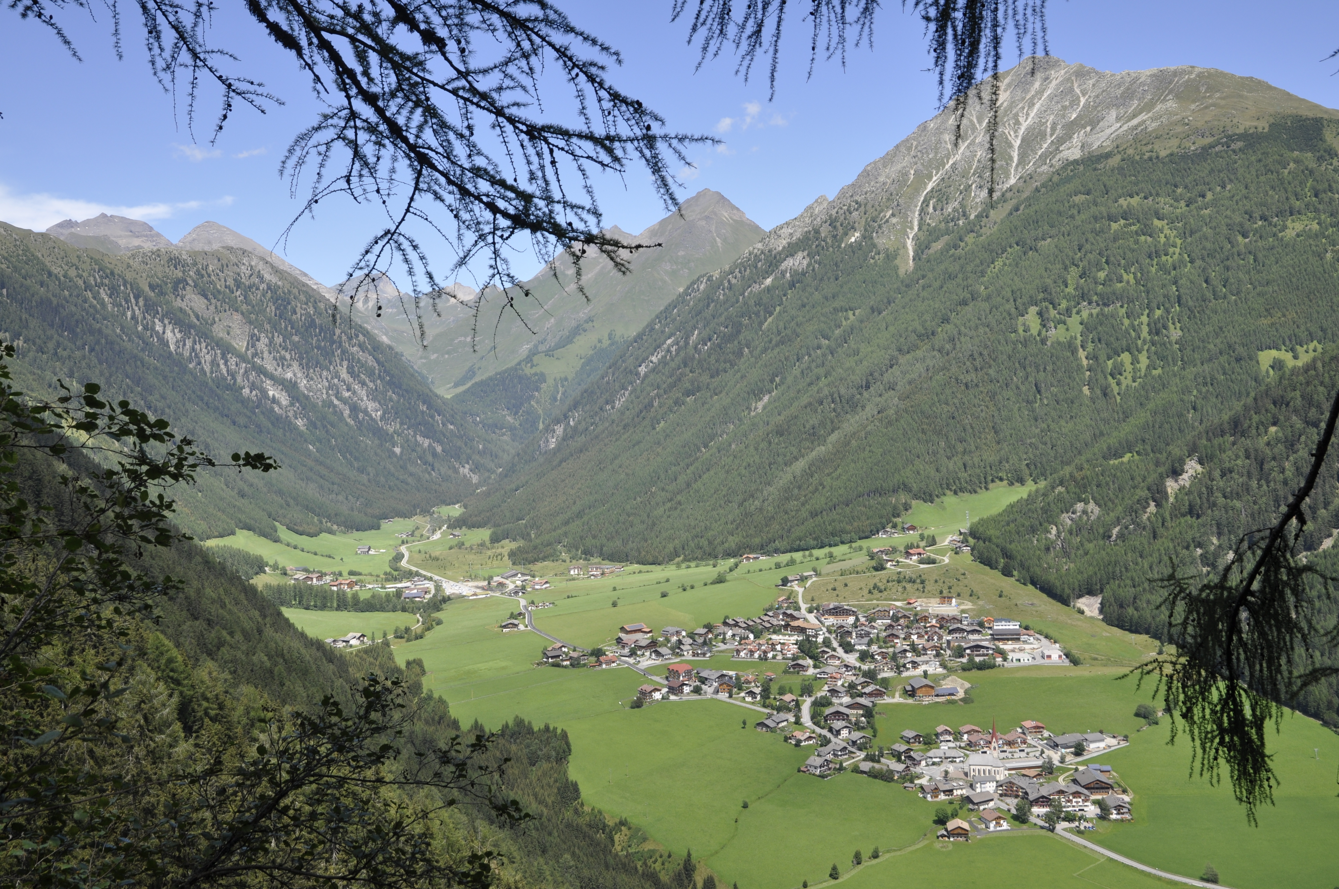 Vals bei Mühlbach - Südtirol